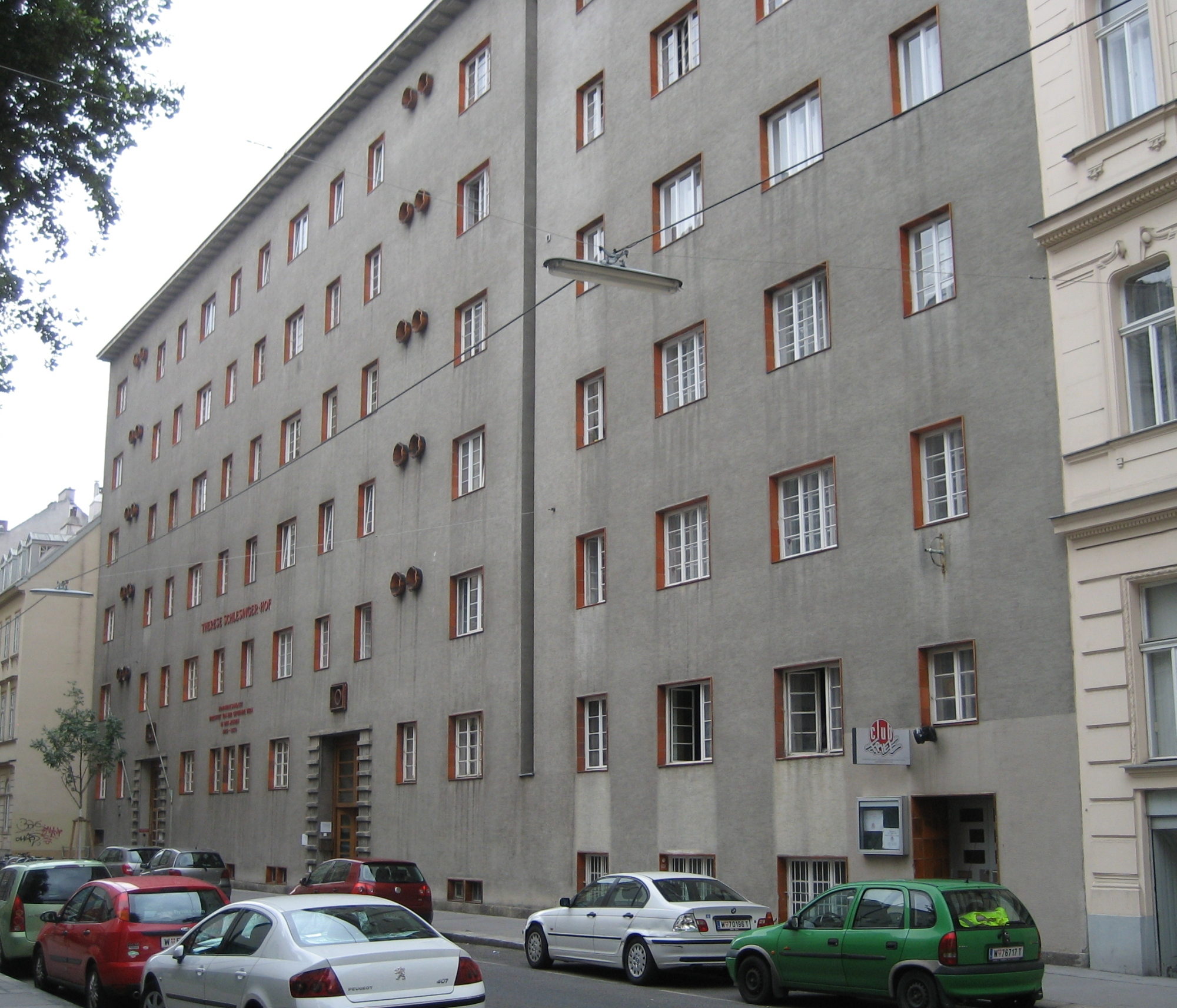 das Haus Wickenburggasse 15 in der Josefstadt, in Wien This media shows the Vienna residential building (Gemeindebau) with the ID 109 (Therese-Schlesinger-Hof).